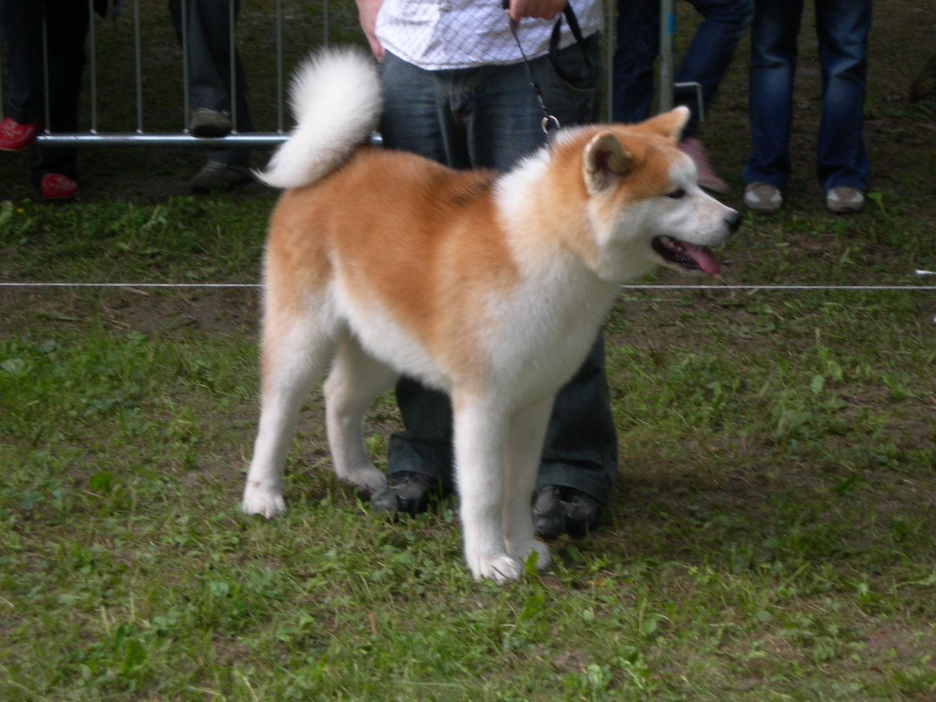 Foto di Villa Correr